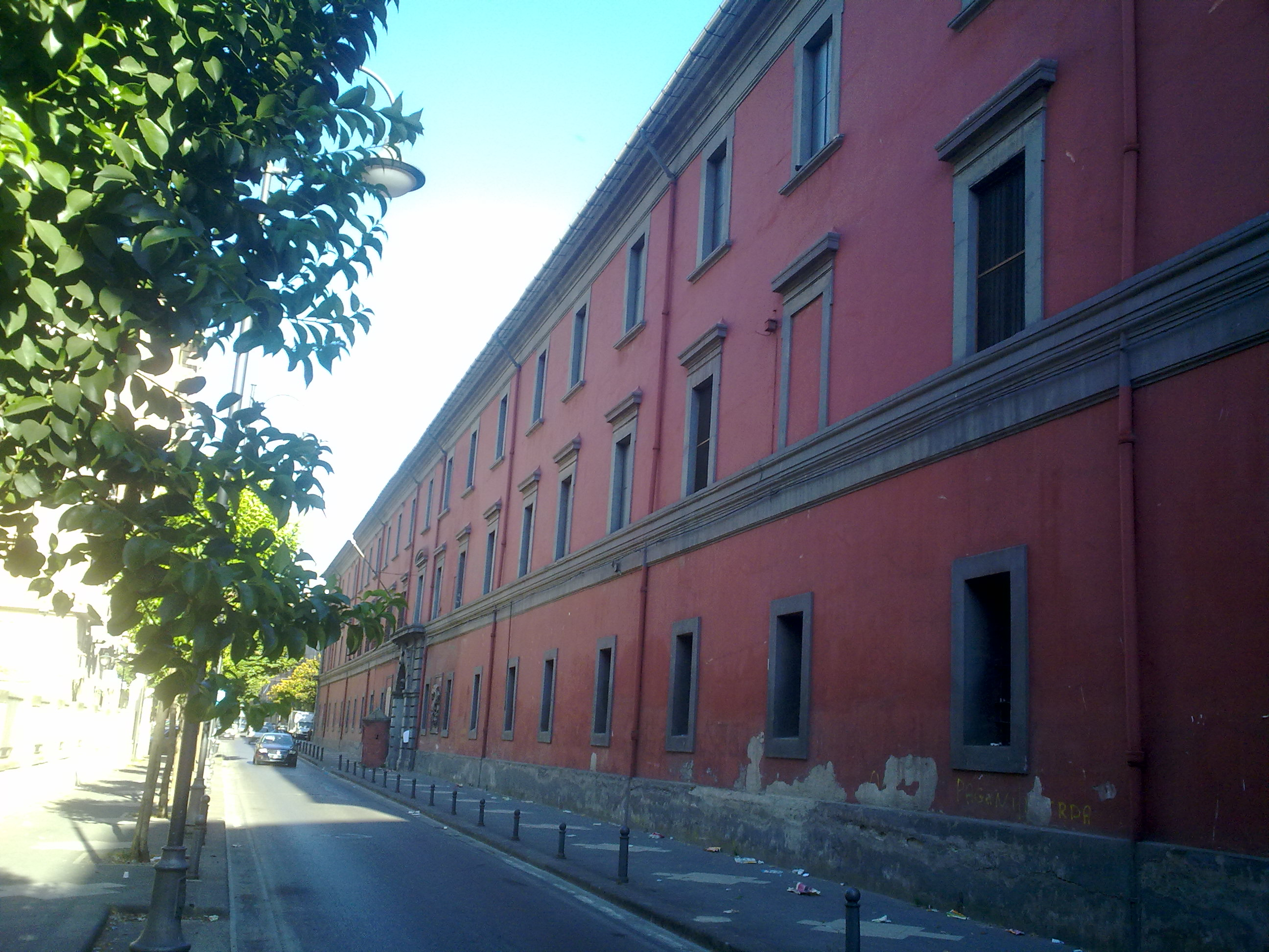 Facciata della Caserma Tofano, Nocera Inferiiore